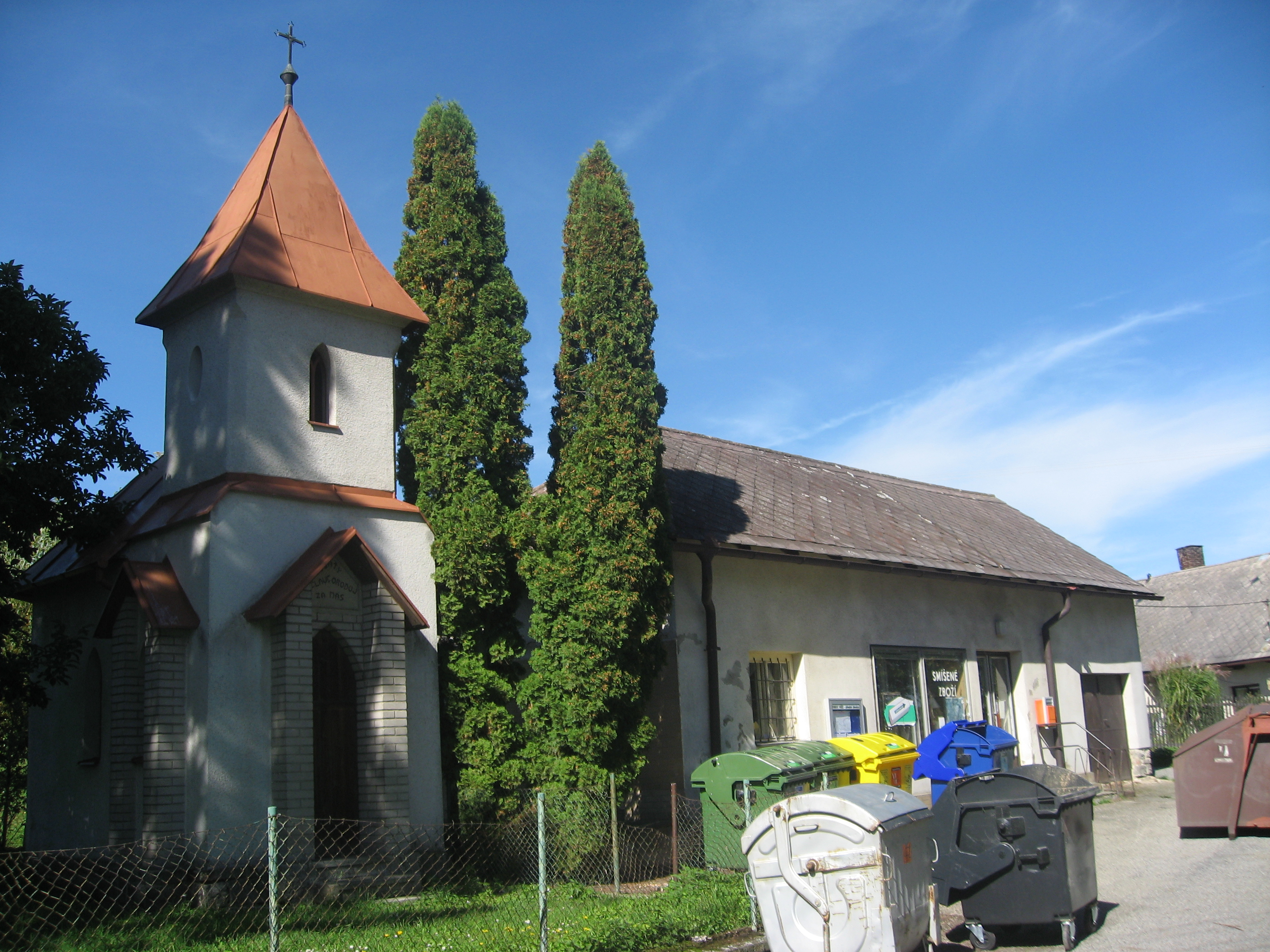 Ves Leština, součást obce Věž